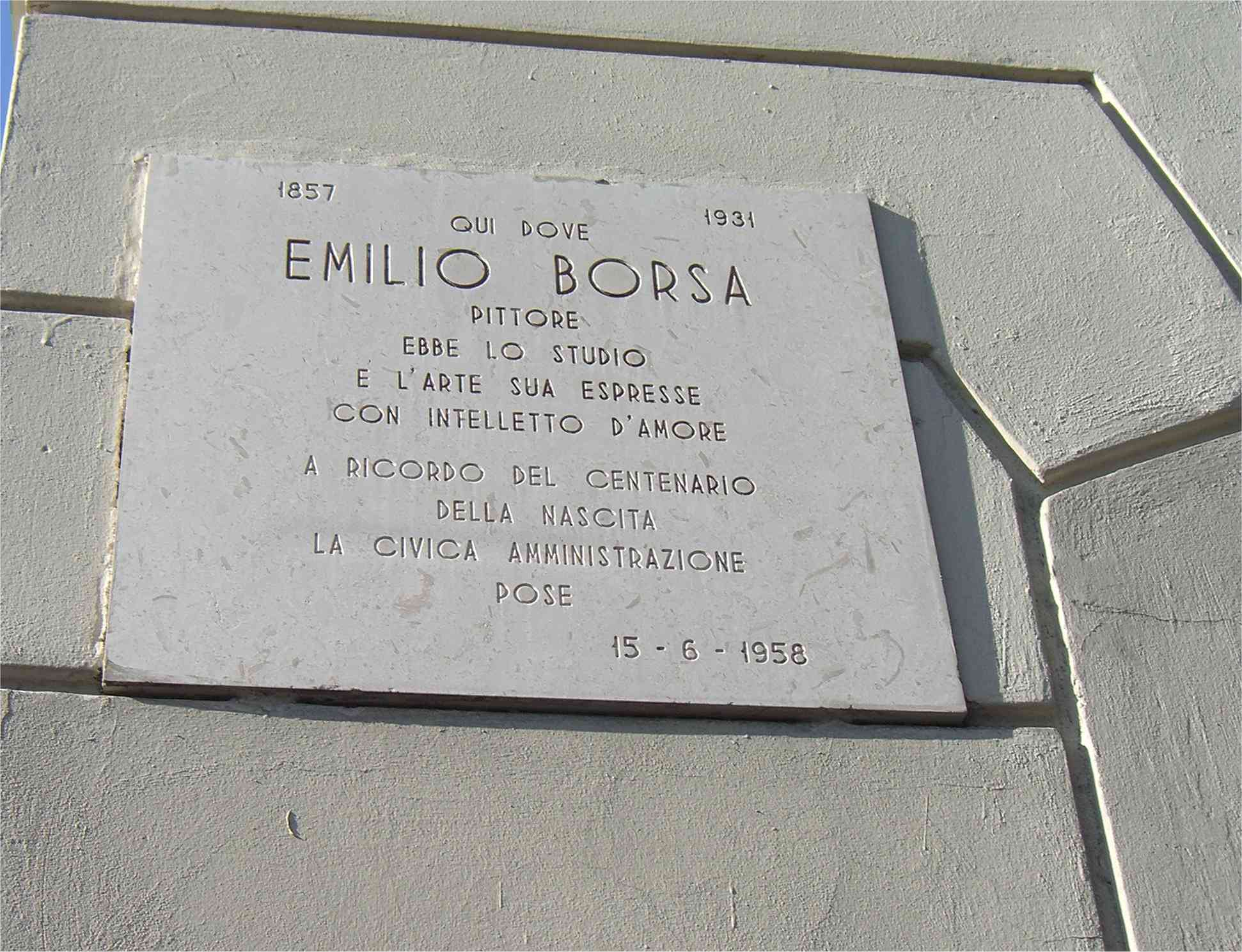 MB Monza lapide sulla casa dove ebbe lo studio il pttore Emilio Borsa in via Appiani a Monza